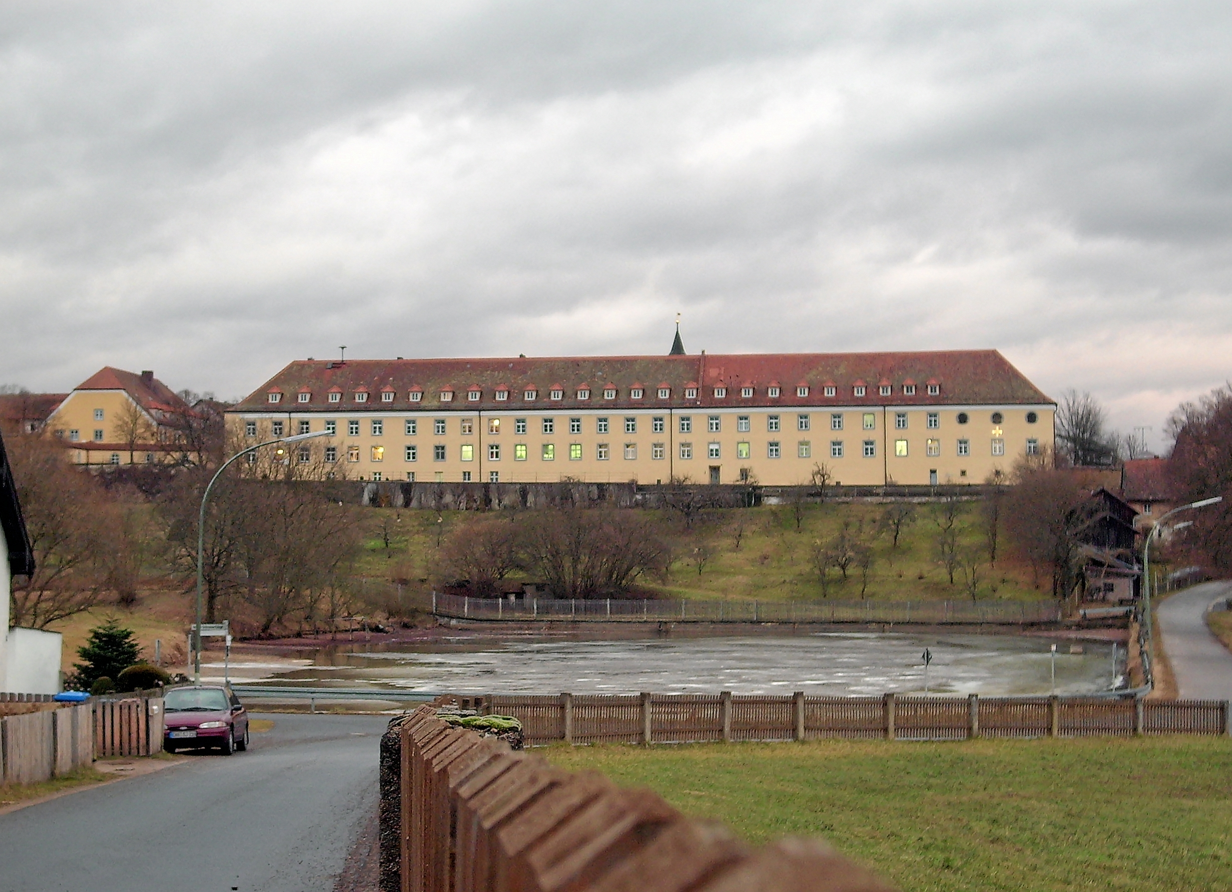 Blick auf das Kloster